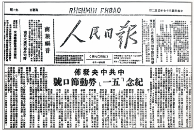 在蔣介石發動內戰和加緊鎮壓民主力量的情況下，各民主黨派轉移到香港或轉入地下繼續同中國共產黨團結合作，開展斗爭。1948年4月30日，中共中央發布紀念“五一”勞動節口號，並由毛澤東寫信給在香港的民主黨派領導人，號召各民主黨派、各人民團體、社會賢達迅速召開政治協商會議，成立民主聯合政府，建立新中國。圖為〈人民日報〉刊登的中共中央紀念五一勞動節口號。